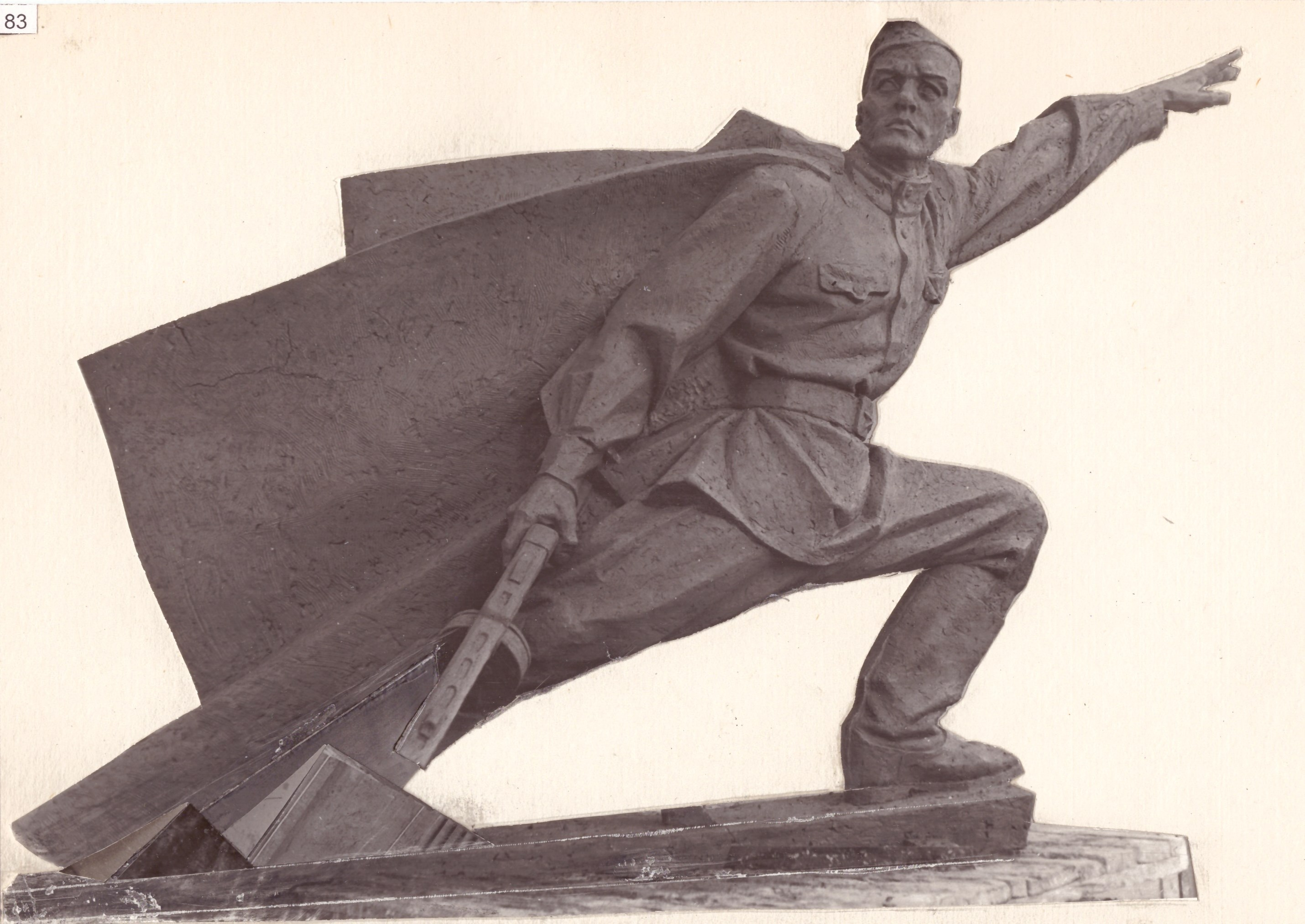 Пам’ятник загиблим воїнам-односельчанам в роки Великої Вітчизняної війни 1941-1945 р.р. С. Куріловці Жмеринський район Вінницька область. 1972. Скульптор Таранченко В.О. Литий бетон.